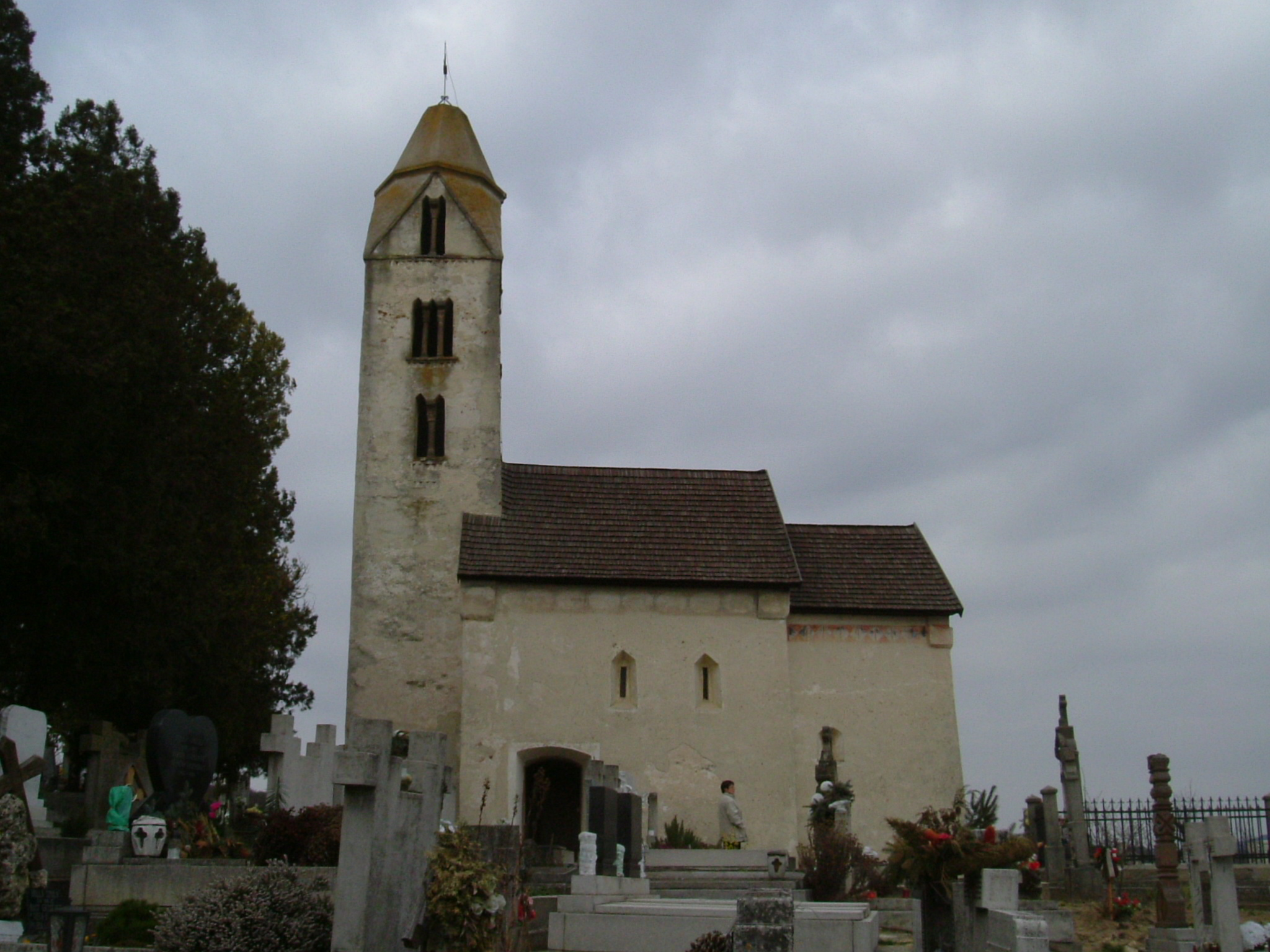 Egregyi (Héviz) Kisboldogasszony román-kori templom